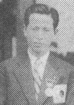 1947년 보스턴 마라톤대회 이후 경교장에서 왼쪽부터 손기정,서윤복,김구,남승룡